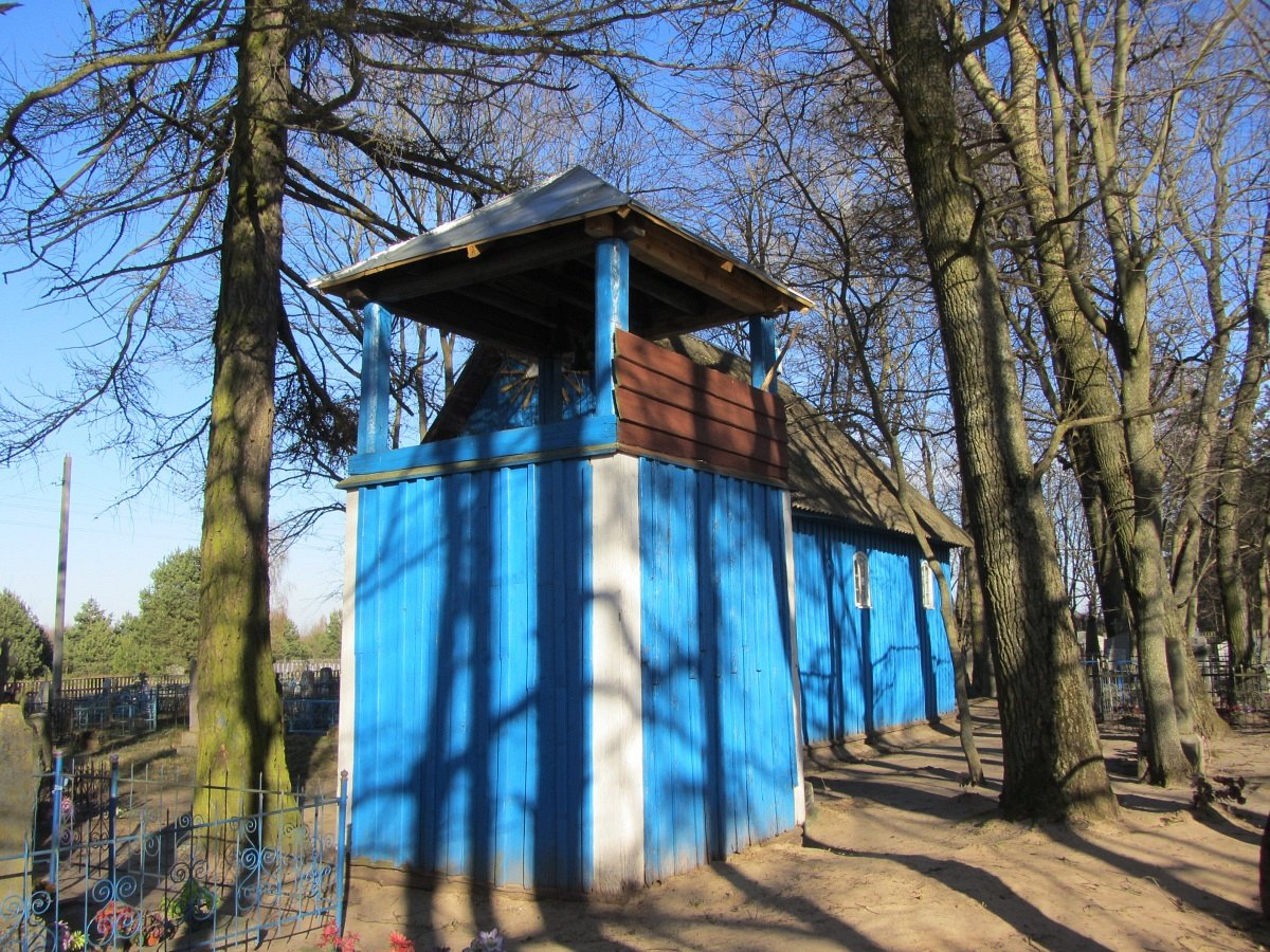 Зарэчча. Свята-Петра-Паўлаўская царква са званіцай